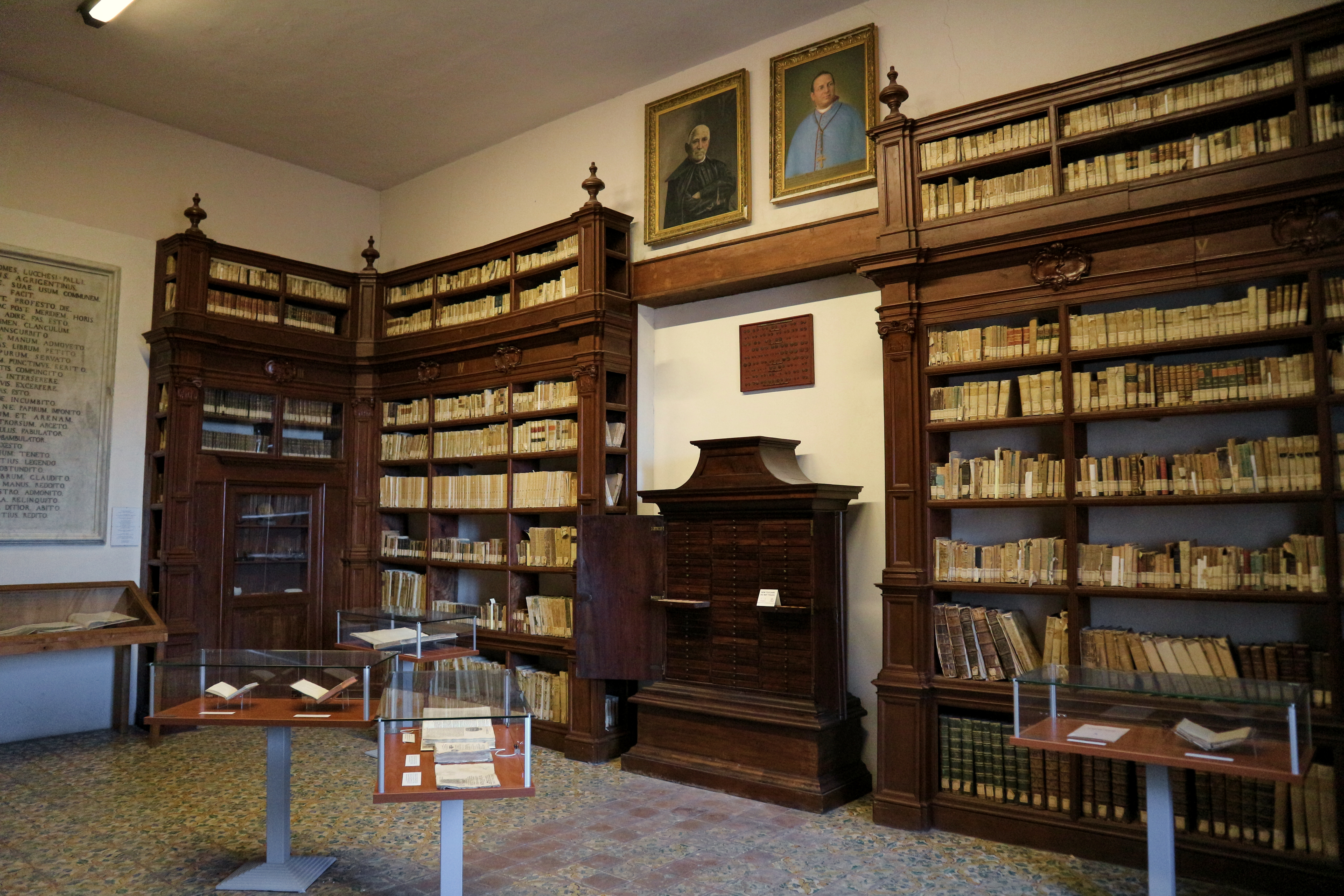 Interni della Biblioteca Lucchesiana di Agrigento.